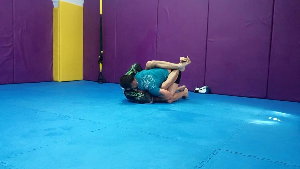 Davljenje - giljotina